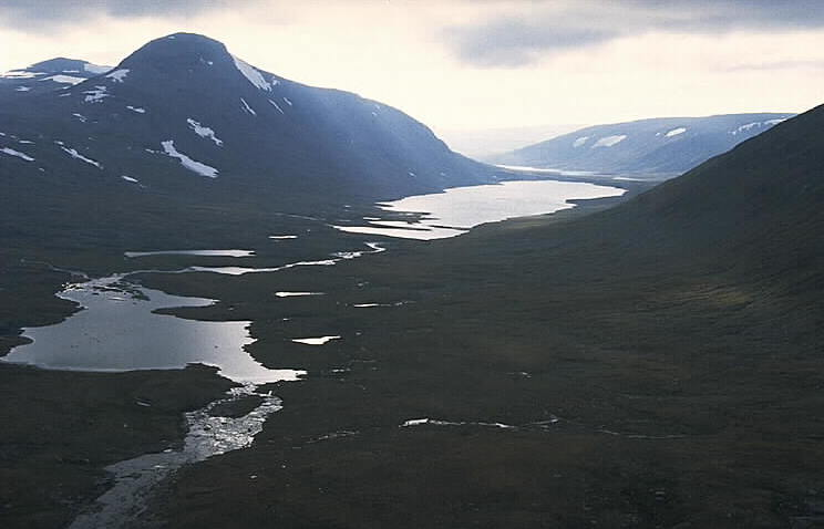 Laisälven Motiv: Vuordnajaure Nyckelord: Flygbilder, Riksintressen Kategori: Fjällbygd Laisälven.